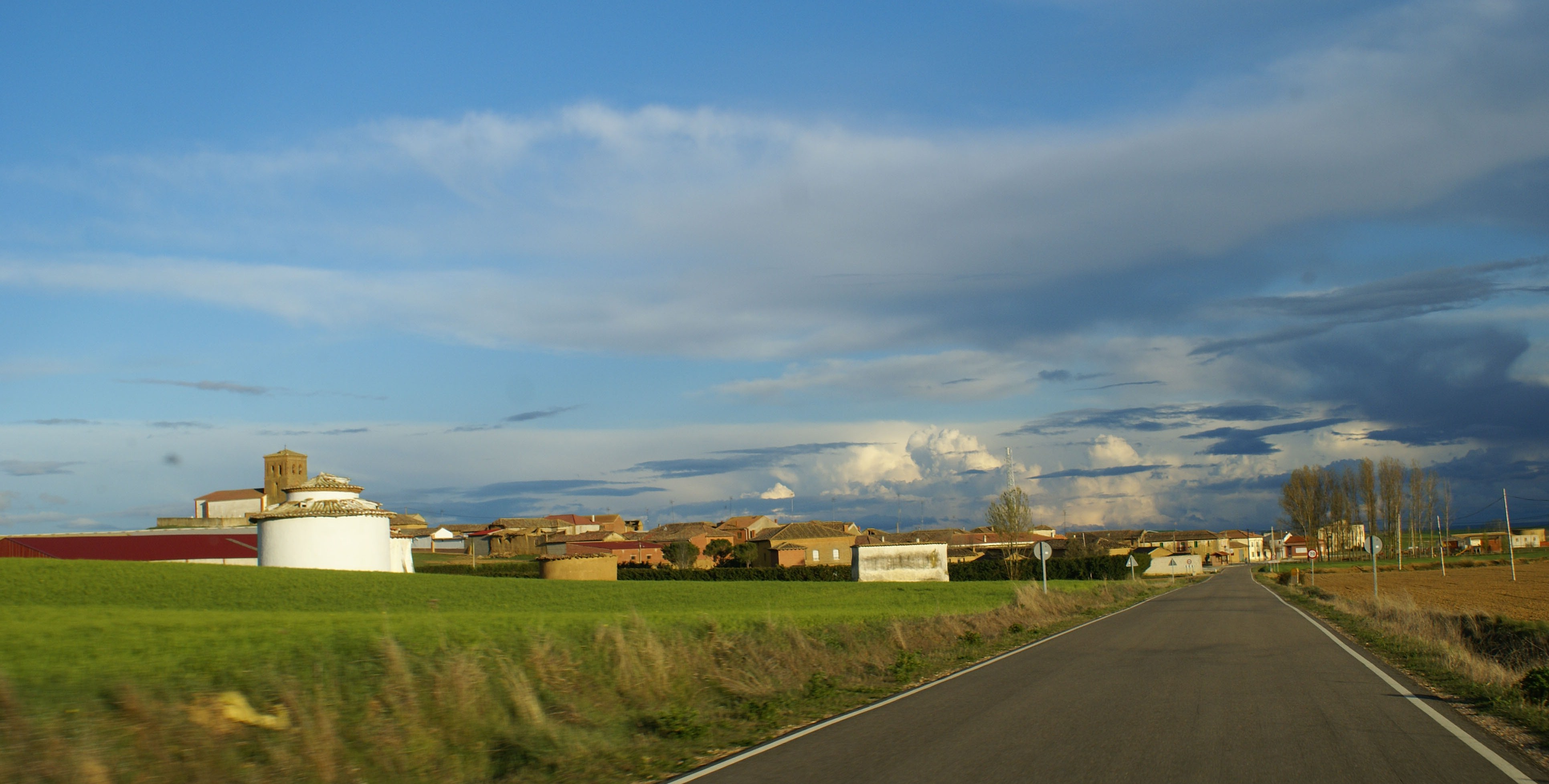 Panorámica de Abastas